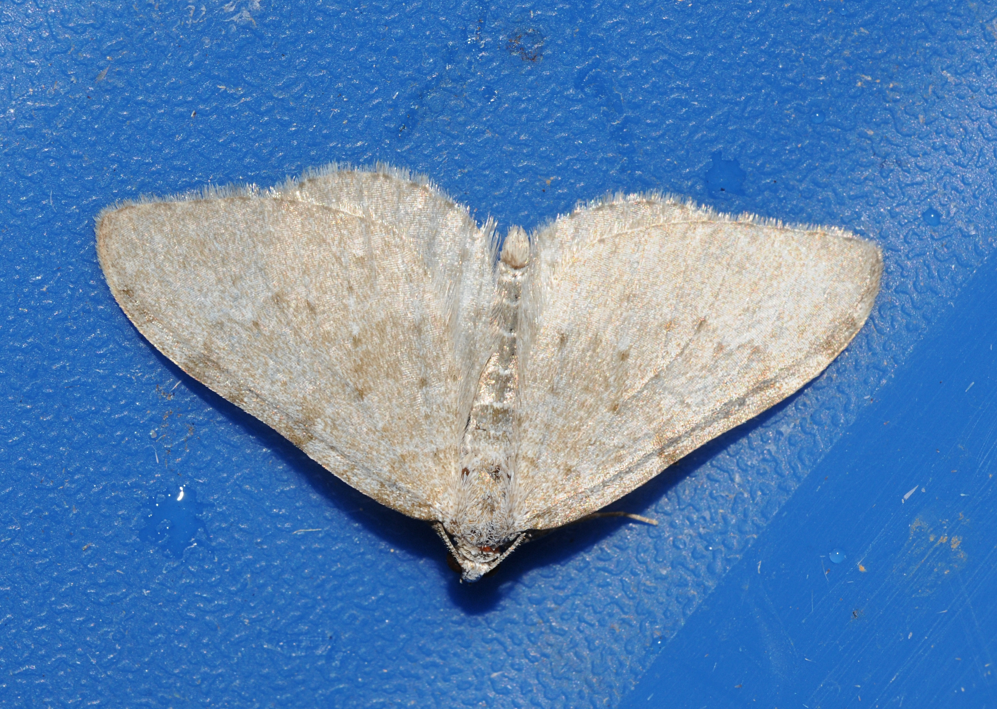 Nebula achromaria